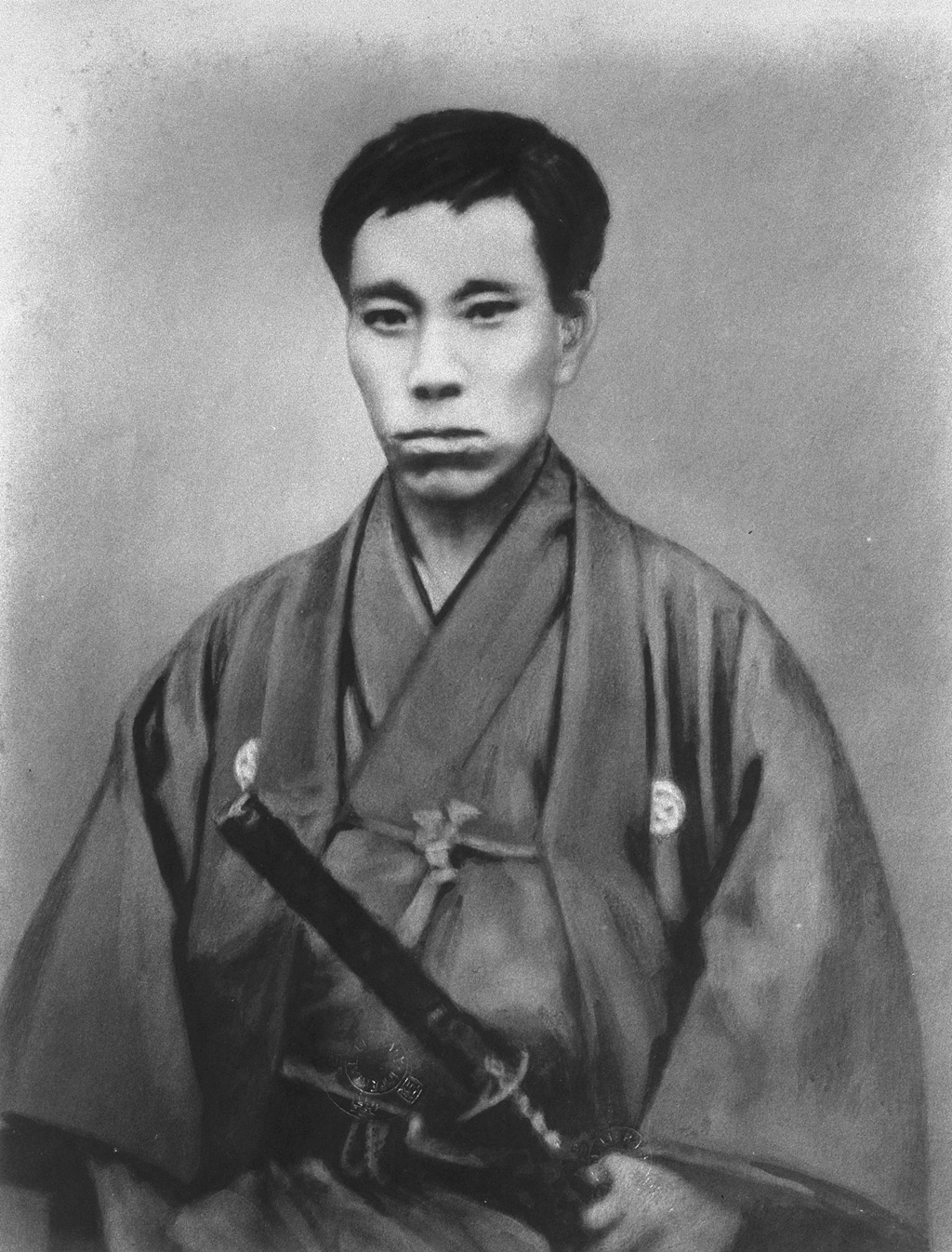 Portrait of Takasugi Shinsaku (高杉晋作, 1839 – 1867)